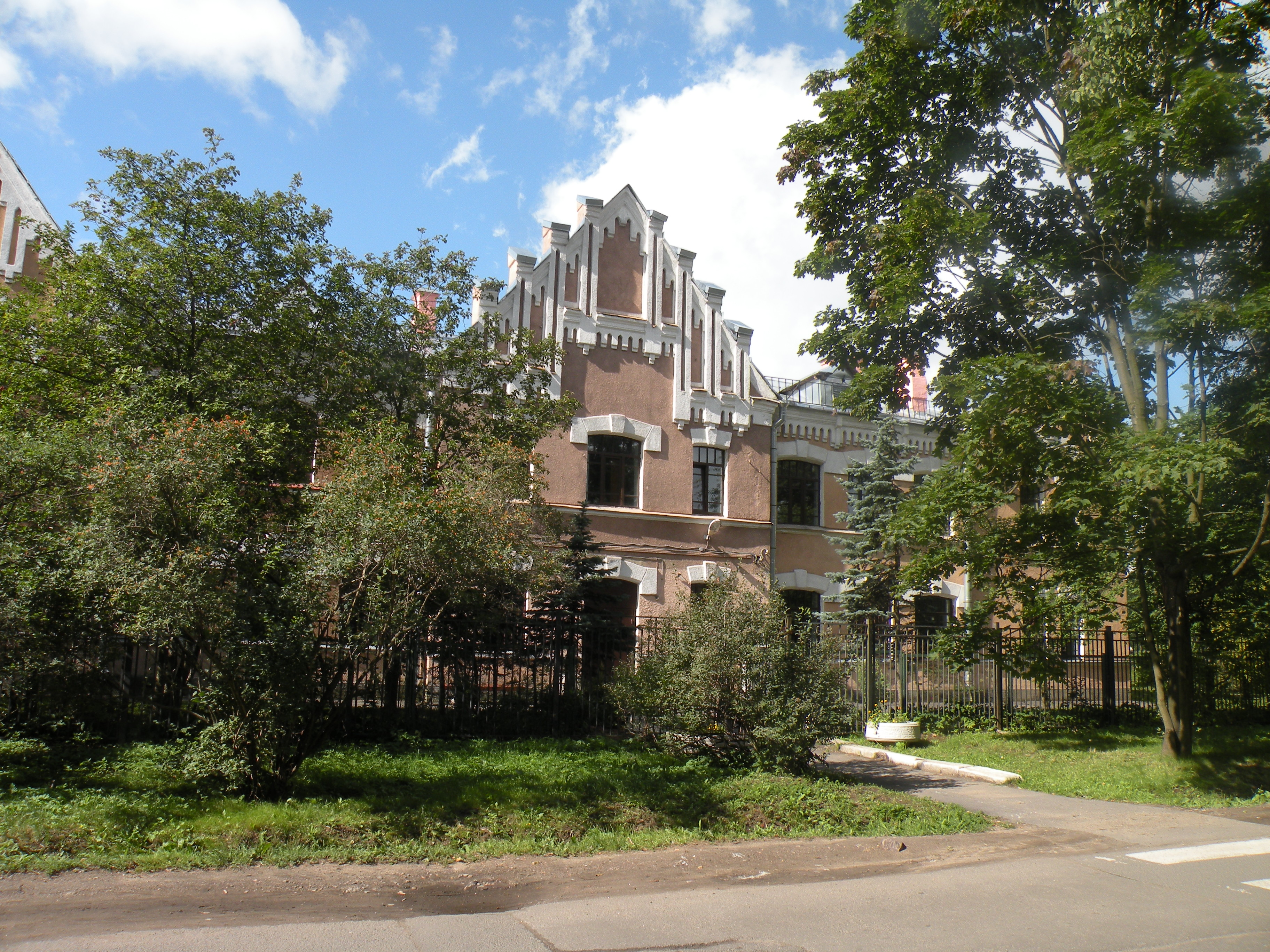 Молитвенный зал в евангелическом приюте во имя Христа Спасителя. Построен в 1907–1909 по проекту воен. инж. В. П. Стаценко [1]